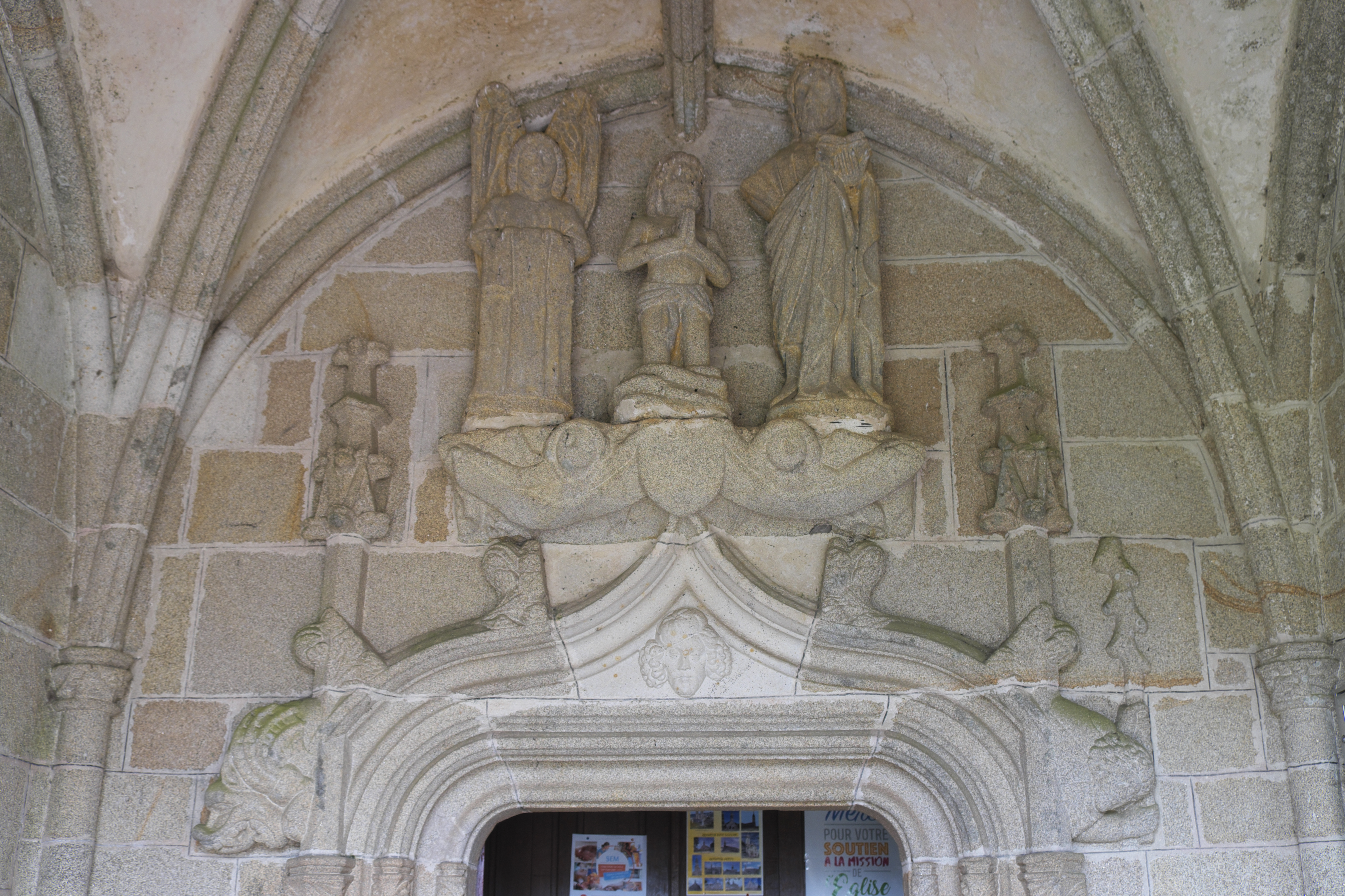 Katholische Kirche Saint-Fiacre in Guengat im Département Finistère (Region Bretagne/Frankreich), Supraporte über dem inneren Portal der südlichen Vorhalle, Taufe Jesu